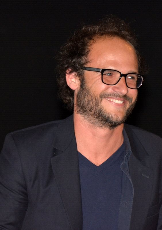 Thomas Lilti à l'avant-première de "Hippocrate"